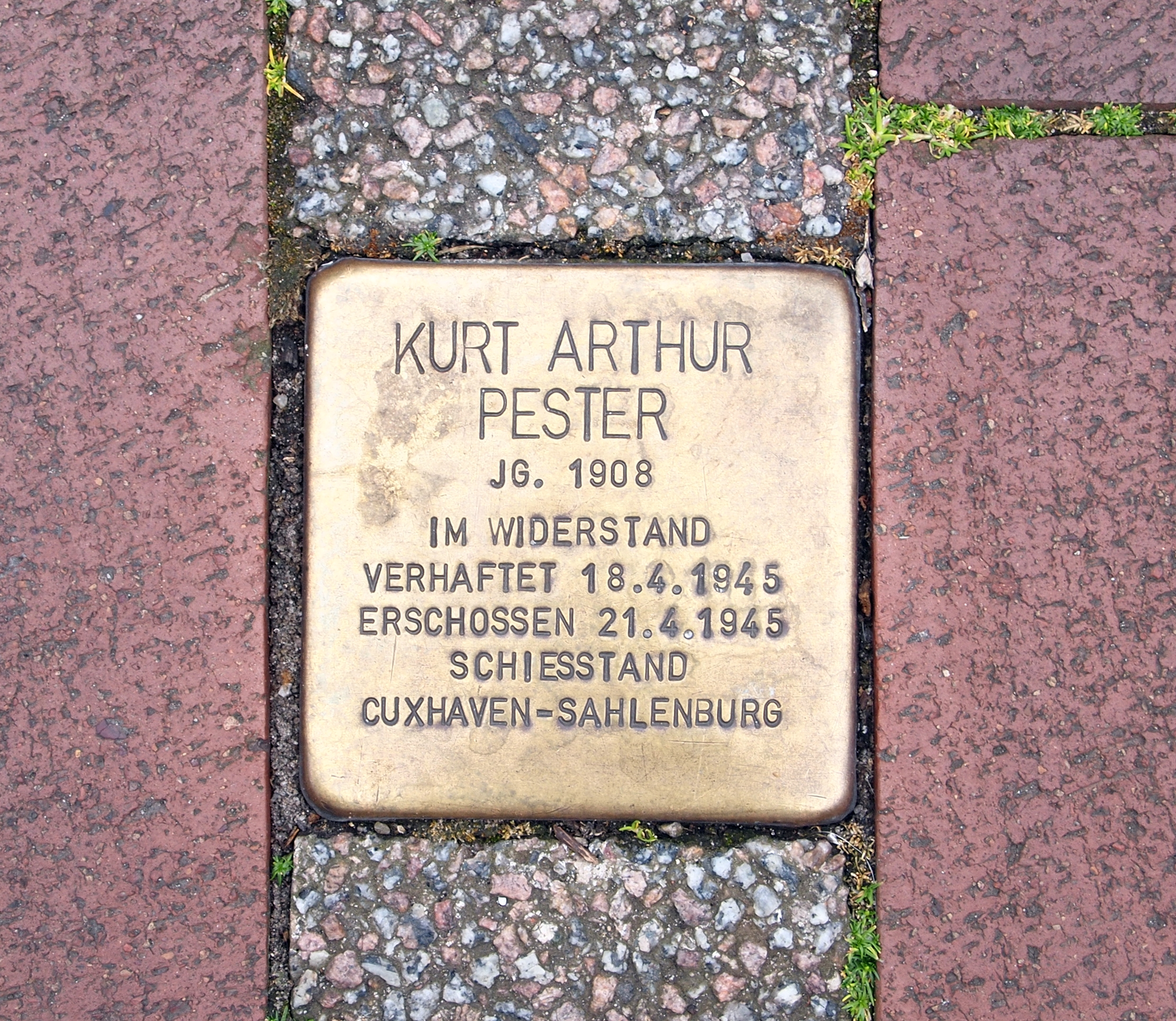 Stolperstein auf Helgoland für Kurt Arthur Pester, Lung Wai, Ecke Aquariumstraße, Unterland